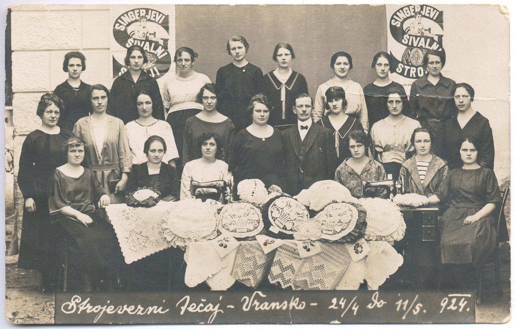 Stara razglednica Vranskega.